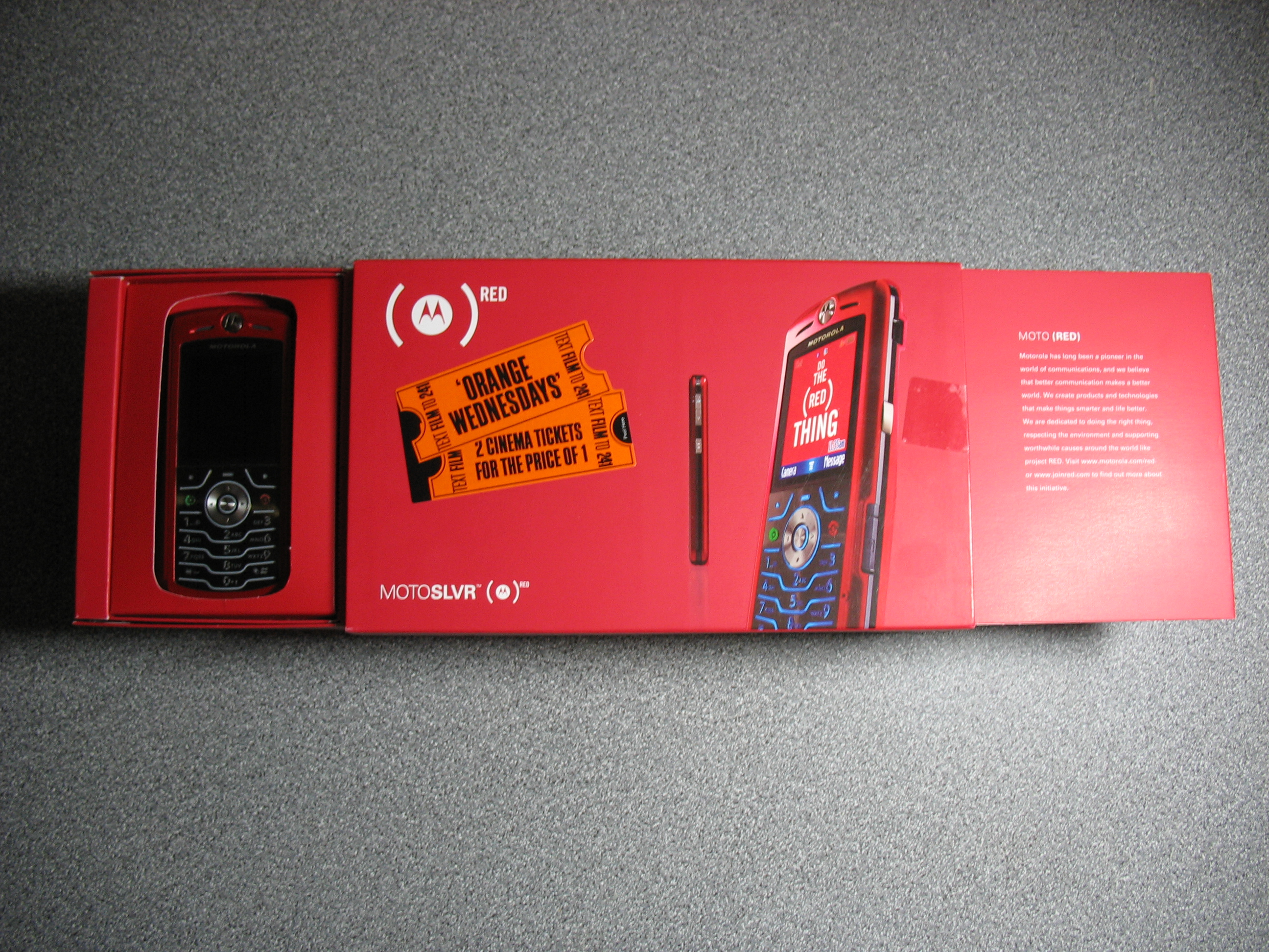 Motorola SLVR rojo